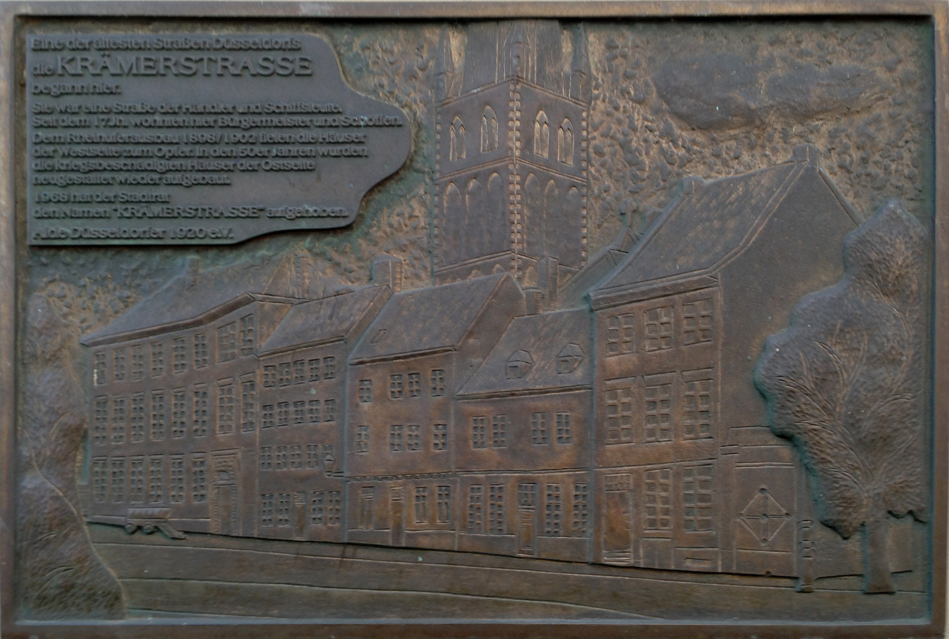 Tafel zu Krämerstraße am Haus Burgplatz 28, Düsseldorf-Altstadt